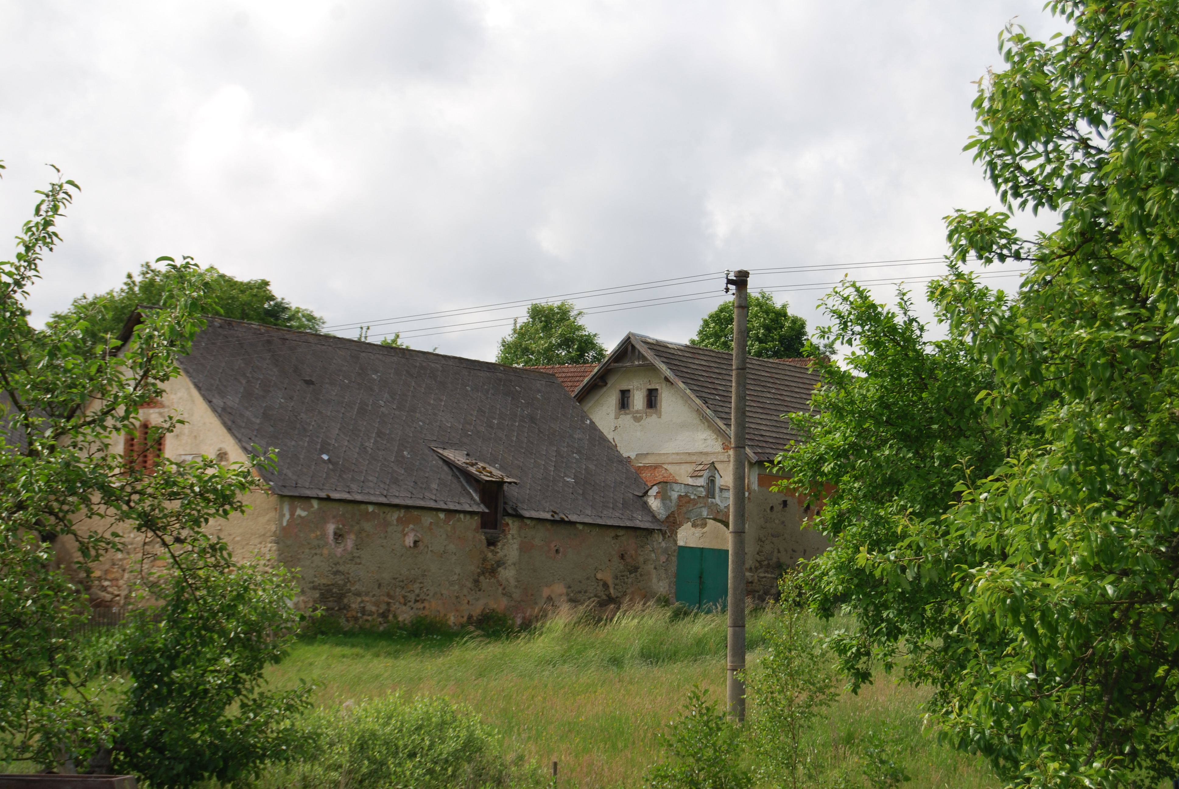 Radíkovy je část obce Chyšky v okrese Písek. Česká republika.